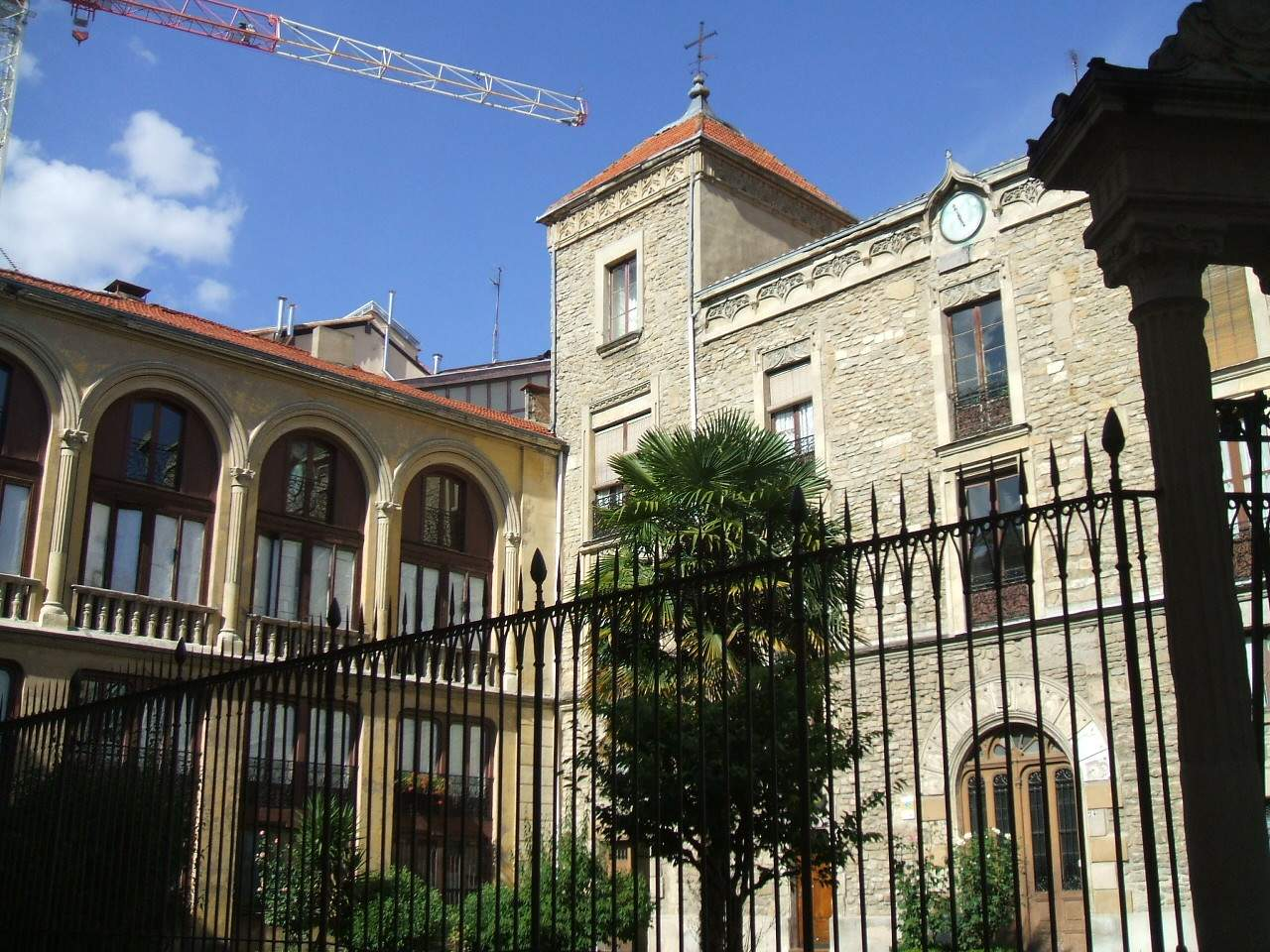 Vitoria - Calle Herrería